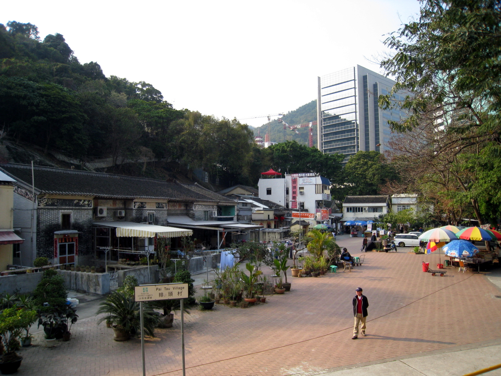 HK Shatin Pai Tau Village